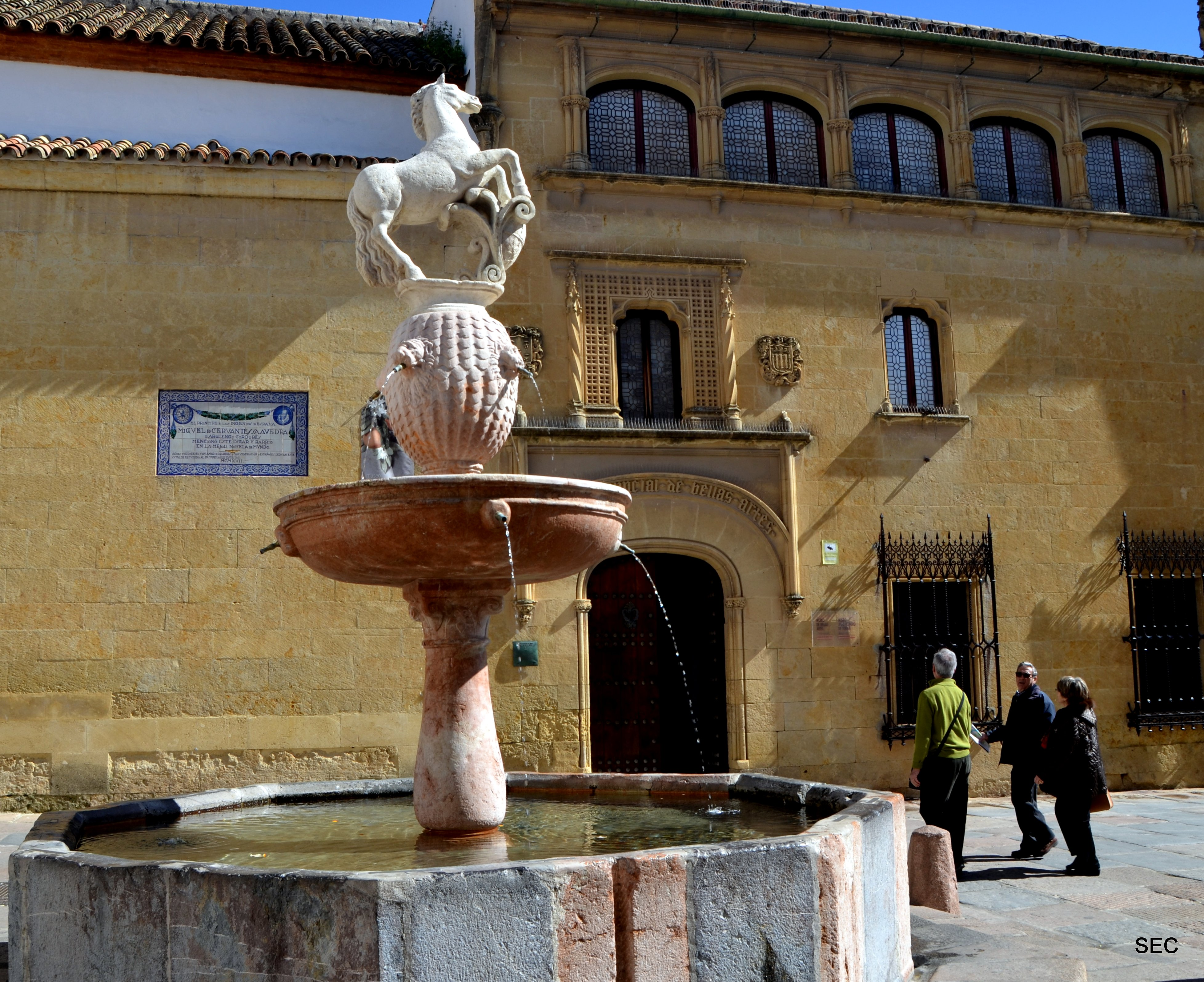 Rincones cordobeses